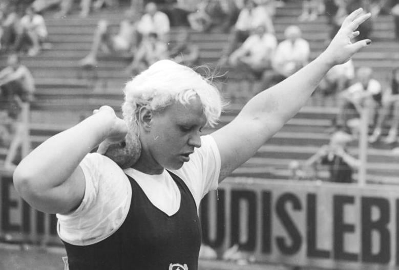 Ilona Slupianek ADN-ZB Demme 2.8.81 Erfurt: DVfL-Sportfest-Sieger im Kugelstoßen wurde am zweiten Wettkampftag bei den Frauen Ilona Slupianek (SCDy) mi 21,29 m.